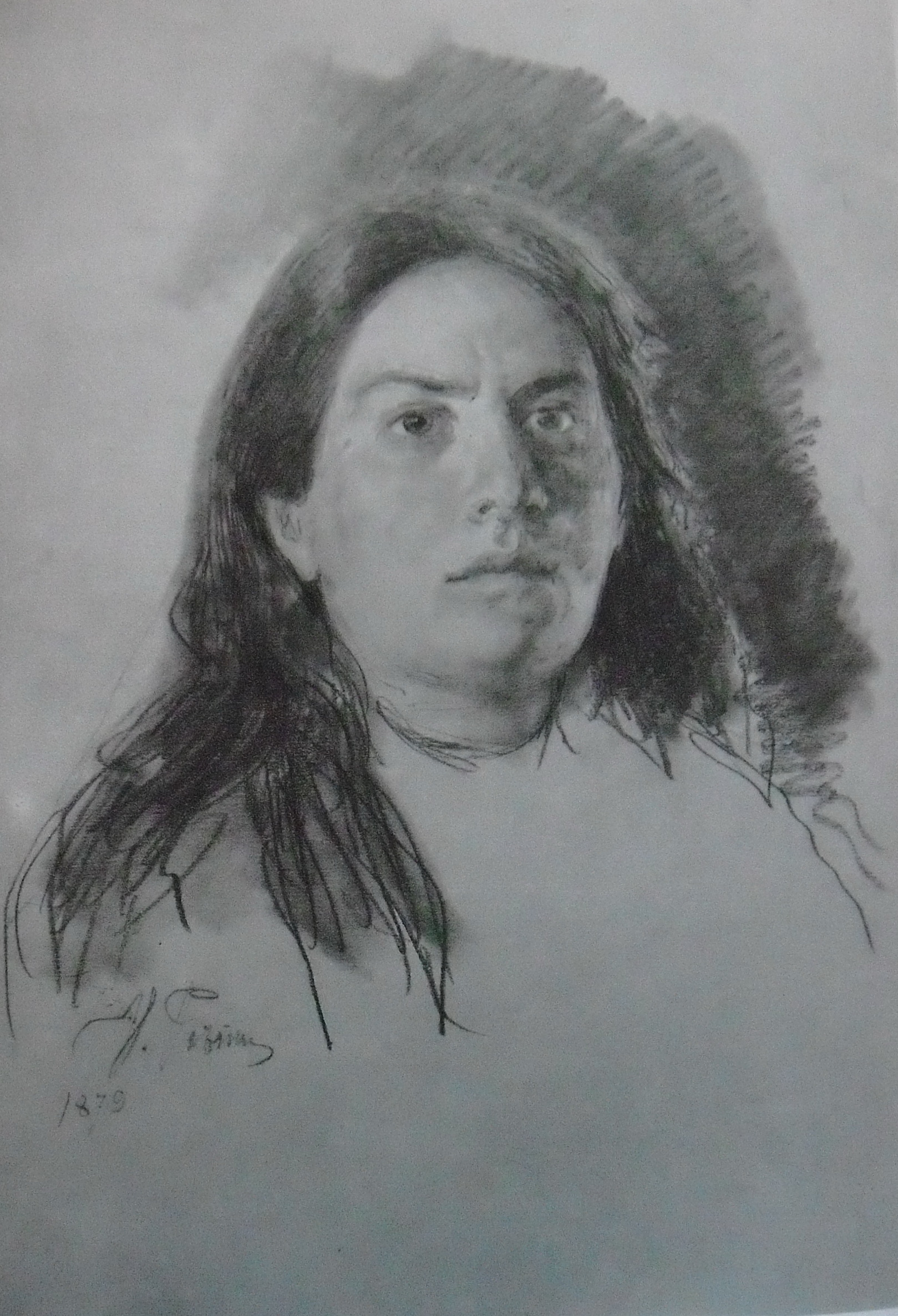 Портрет В.С. Серовой. Этюд, создан в связи с работой над картиной "Царевна Софья". В.С. Серова - композитор, педагог, жена композитора А.Н. Серова, мать художника В.А. Серова.